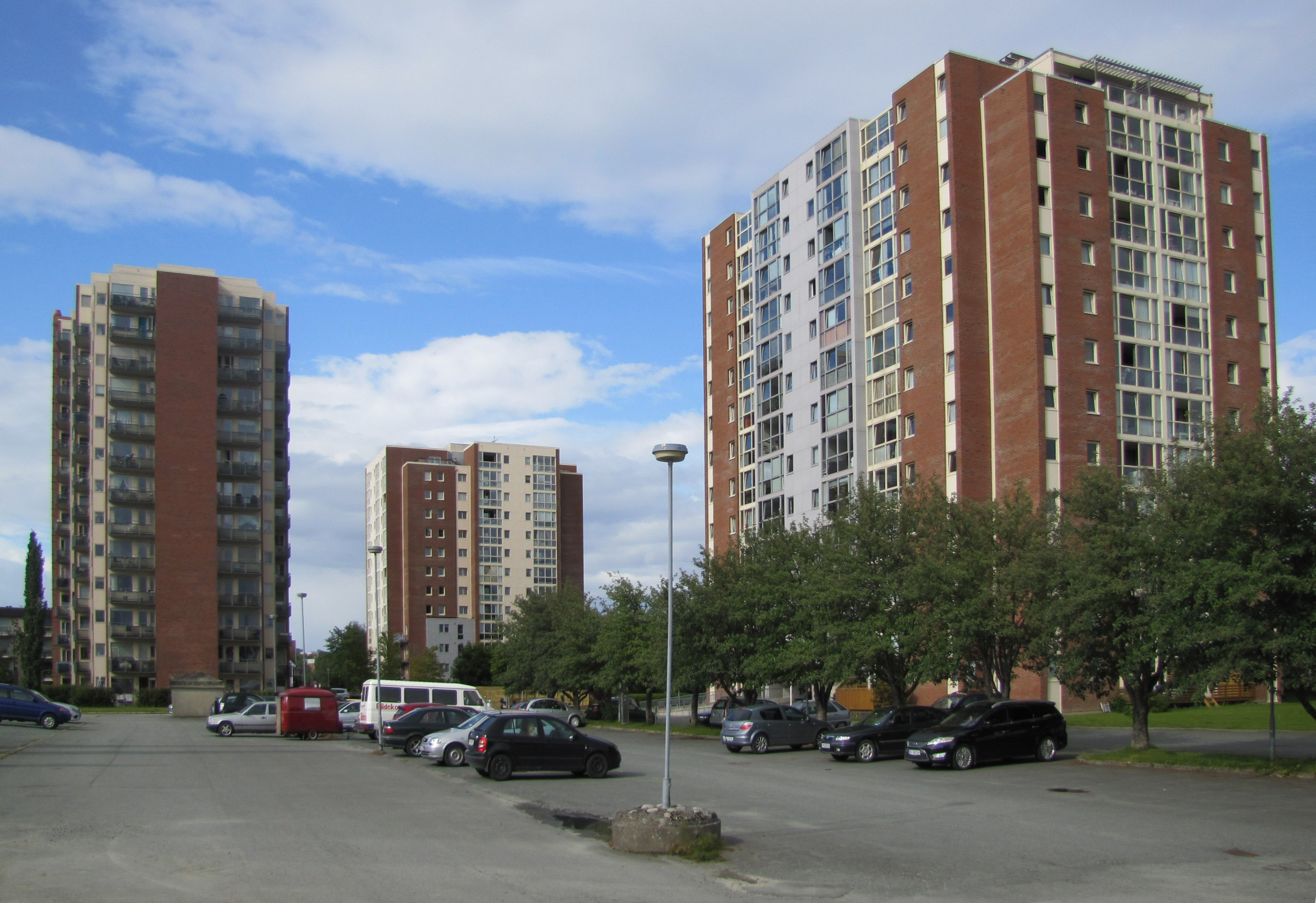 Tempeveien, Trondheim